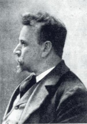 Portrait photographique en buste et de profil de l'architecte et sculpteur néerlandais Simon Miedema (1860-1934).